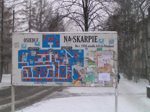 Kraków - Plan osiedla Na Skarpie